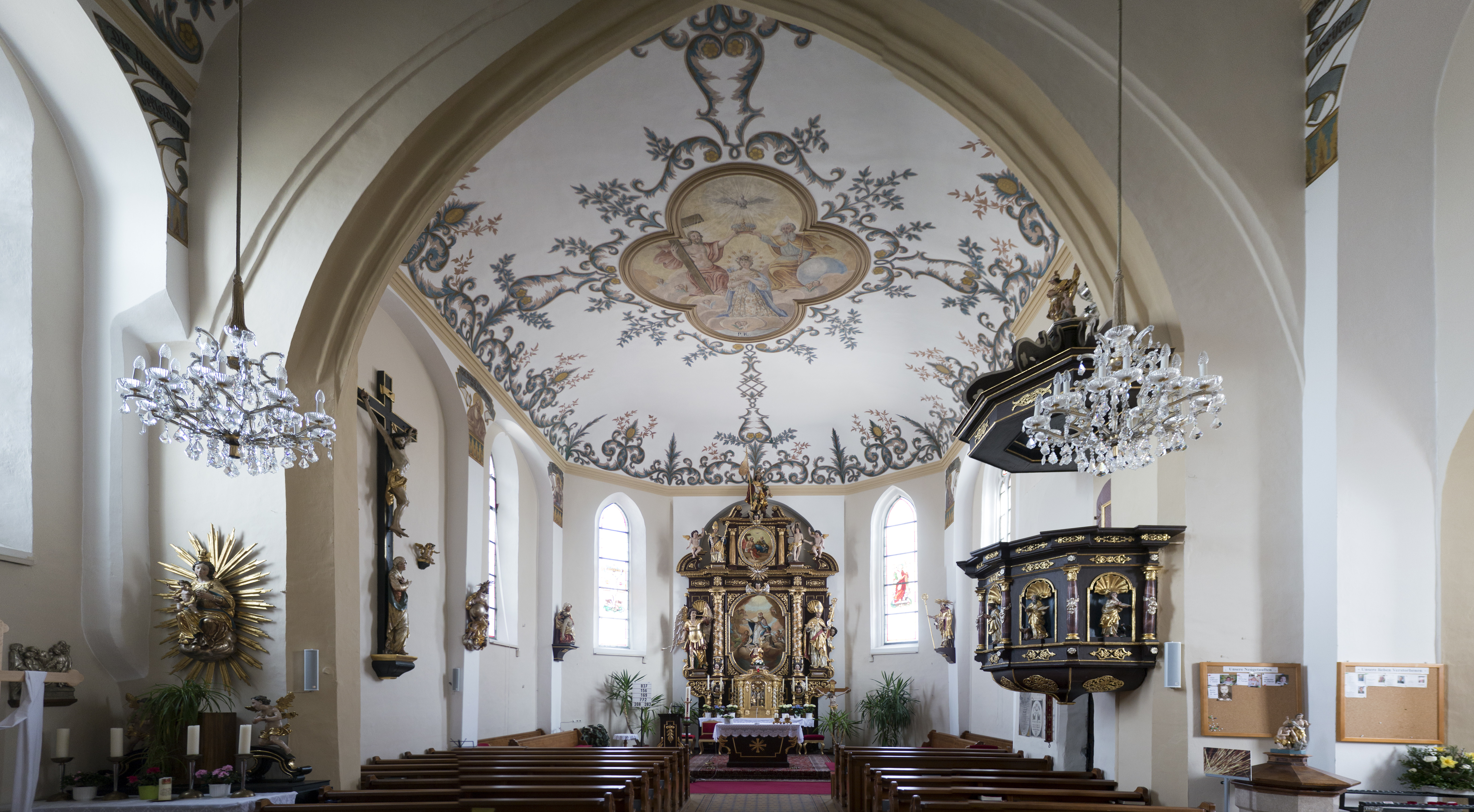 Kath. Pfarrkirche hl. Martin und Friedhof